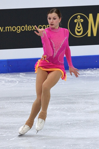 Моника Симанчикова (Словакия) на чемпионате мира по фигурному катанию среди юниоров 2012